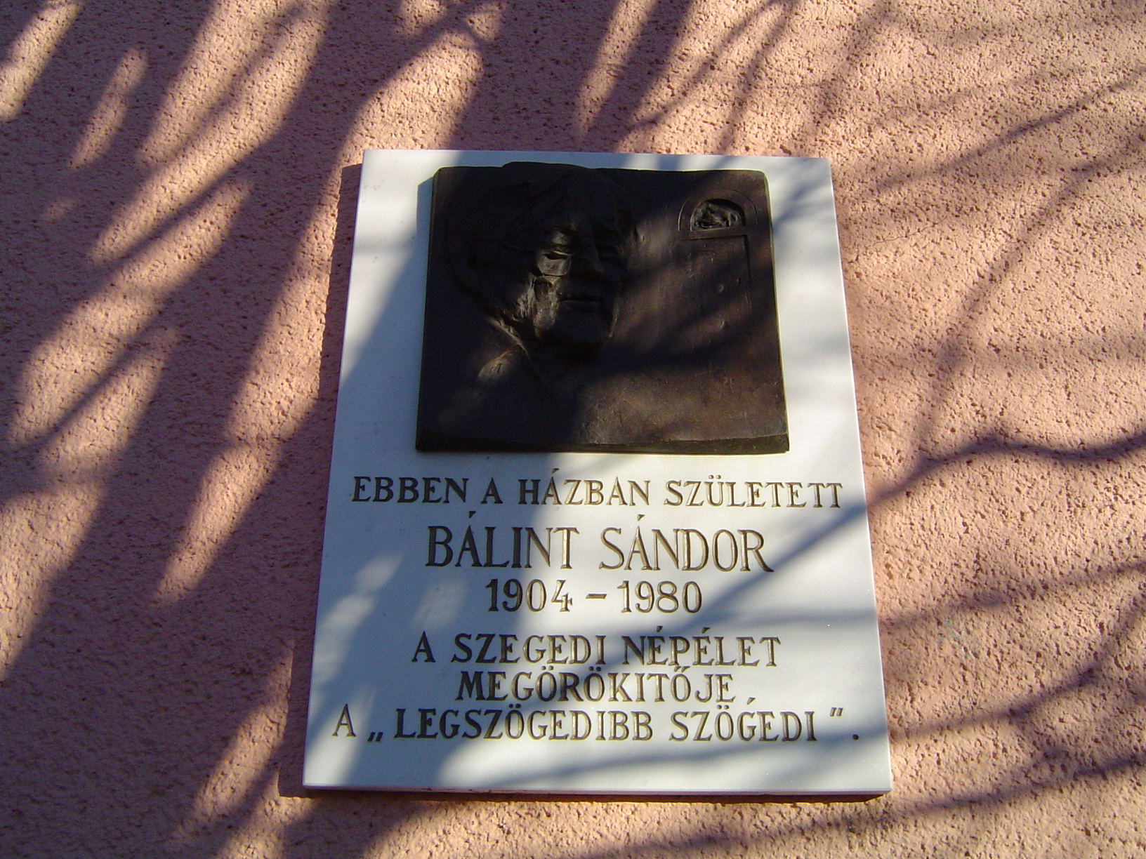 Szeged, Alsóváros. Emléktábla Bálint Sándor szülőházán. Bálint Sándor szülőháza a Pálfy utca 72. sz. alatt volt. A szülőházon levő emléktáblát 1984-ben Sőtér István akadémikus, irodalomtörténész leplezte le. Bálint Sándor domborművét Szathmáry Gyöngyi készítette. Mindössze 1984-től 2004. aug. 4-ig maradt fent az emléktábla, mert 2004. augusztus 4.-én Bálint Sándor születésének 100. évfordulóján elkezdték szülőházának bontását, mára már társas ház épült a helyén. Forrás: Somorjai Ferenc: Szeged. (Ser. Panoráma : magyar városok, ISSN 0134-1812) Budapest, Medicina, 2002. 325 o. ill. Bibl. 316. o. ISBN 9632438604 Bálint Sándor szülőházáról ld. 194. o.